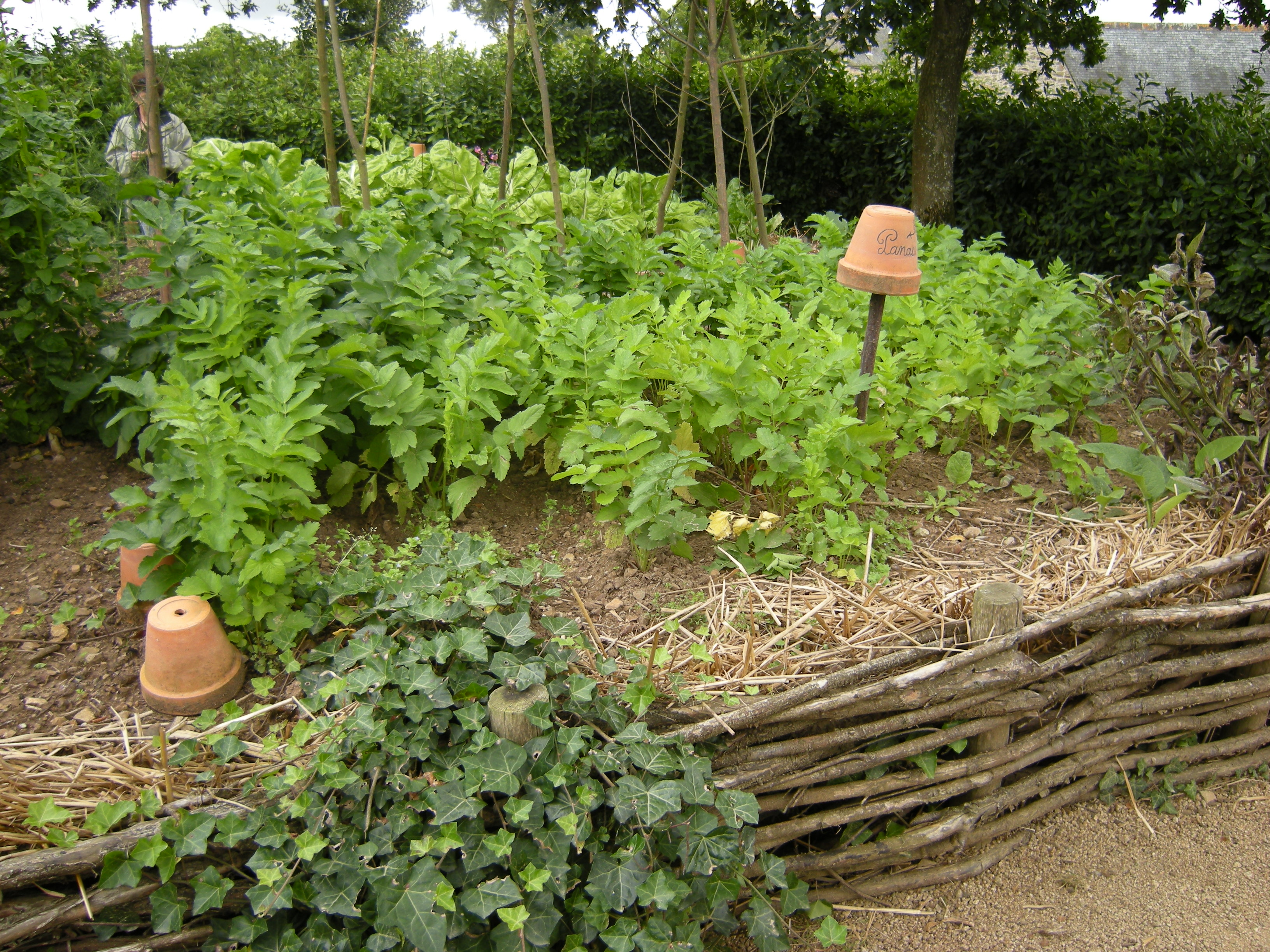 Château de la Roche-Jagu. Vues générales du château, des jardins et du Trieux Culture de panais